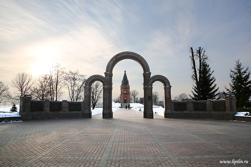 Магілёў. Буйніцкае поле